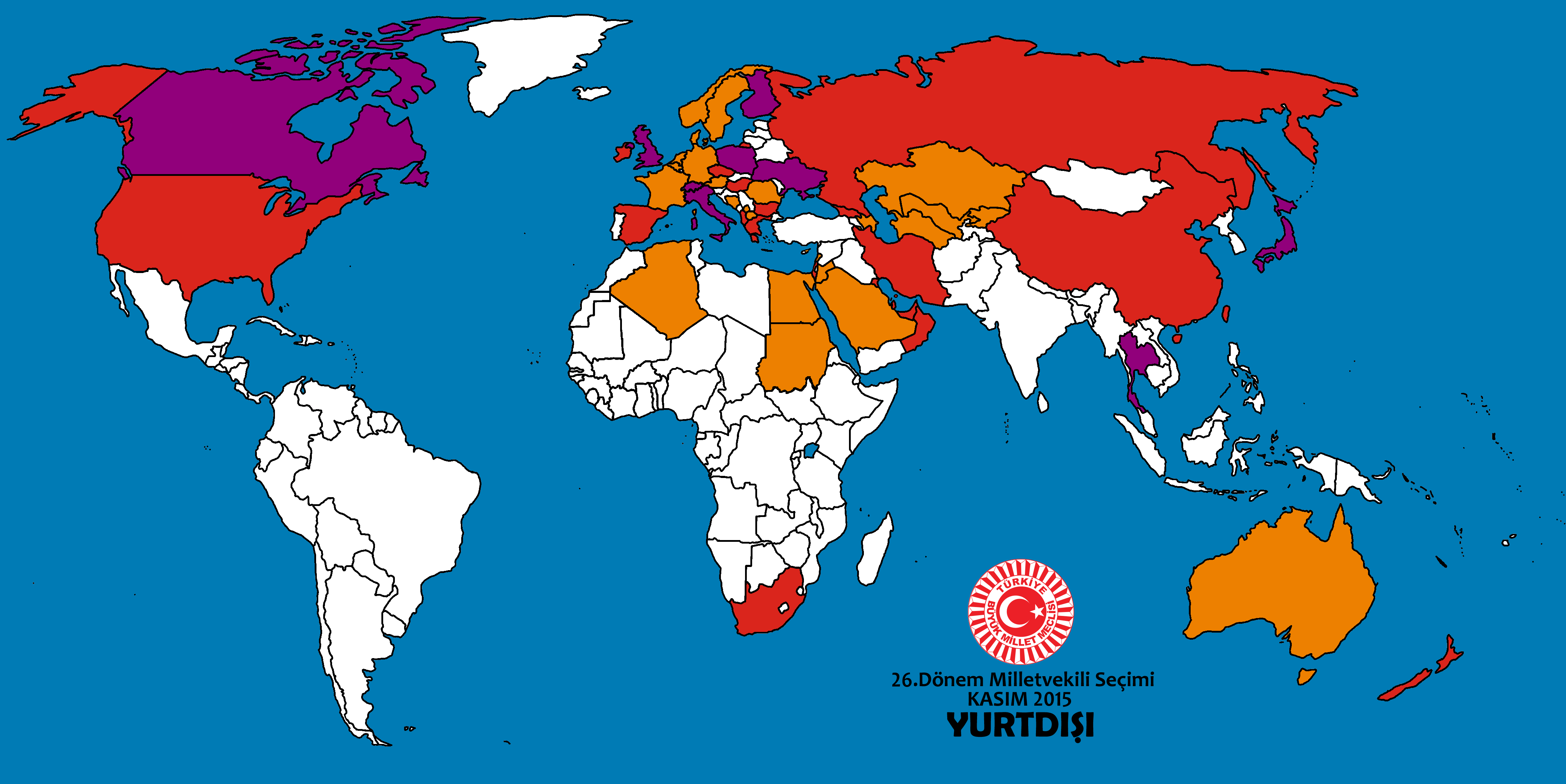 Yurt dışındaki 54 ülkenin toplam sonucu